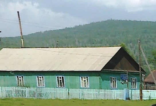 Здание Баянгольской администрации